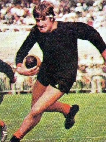 Walter Spanghero en 1973 - Campioni dello Sport 1973-1974, n°317